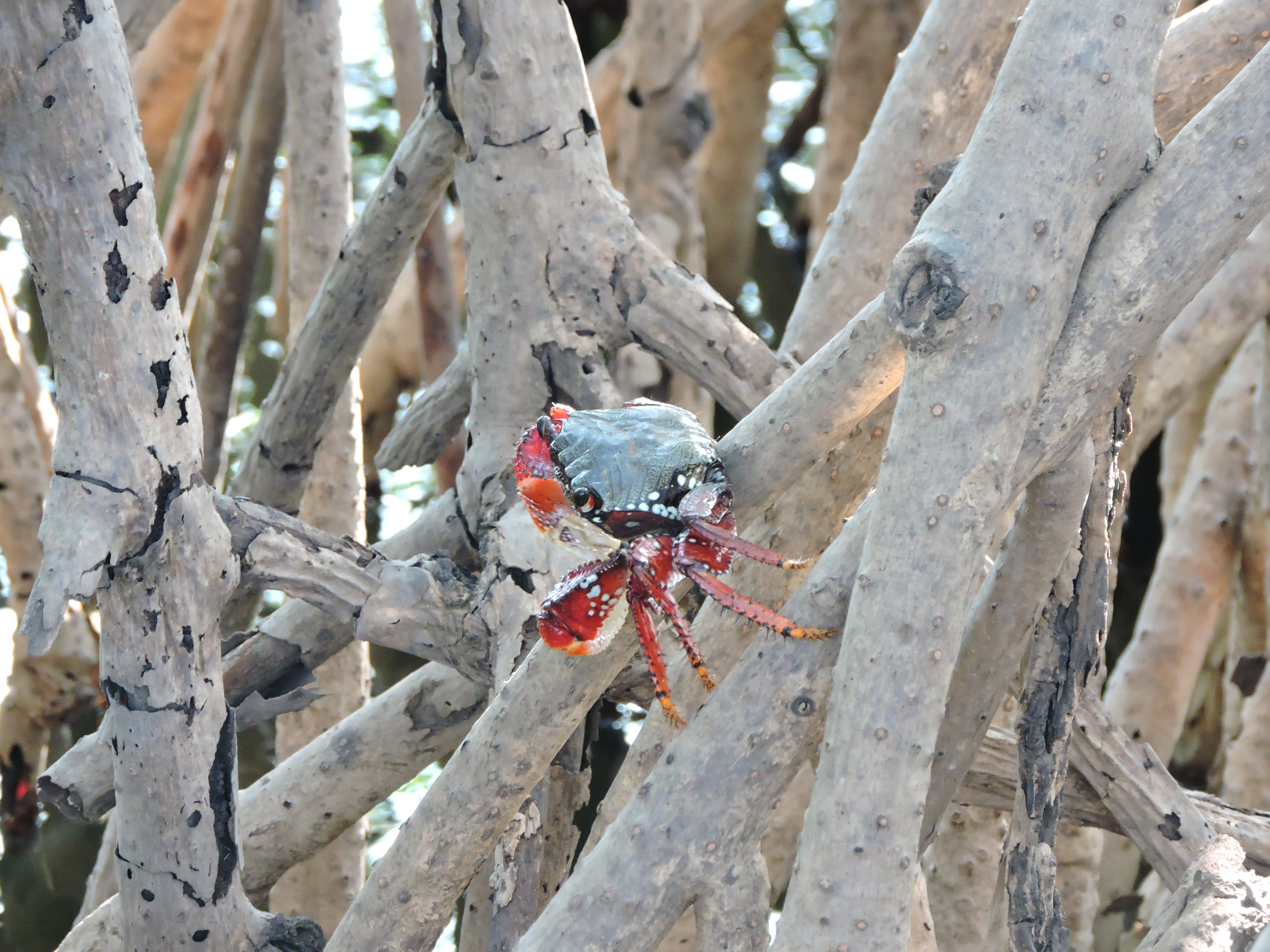 foto tiradas no bacanga